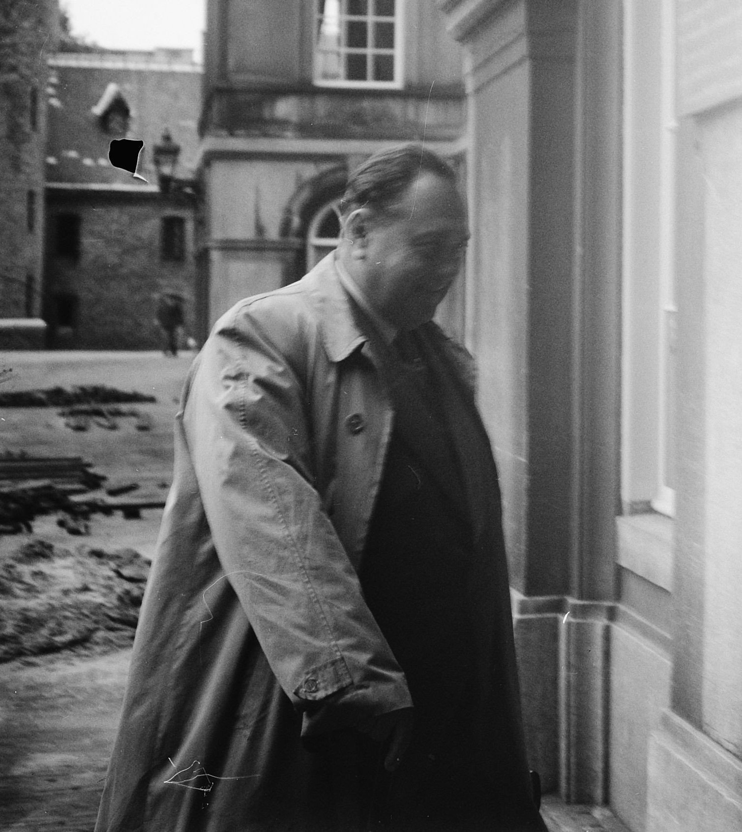 Collectie / Archief : Fotocollectie Anefo Reportage / Serie : [ onbekend ] Beschrijving : Dr. F. Kersten voor de Enquete-commissie Den Haag / overbelicht Datum : 15 september 1948 Trefwoorden : enquete-commissies Fotograaf : Steenkamp, […] / Anefo Auteursrechthebbende : Nationaal Archief Materiaalsoort : Glasnegatief Nummer archiefinventaris : bekijk toegang 2.24.01.09 Bestanddeelnummer : 903-0004